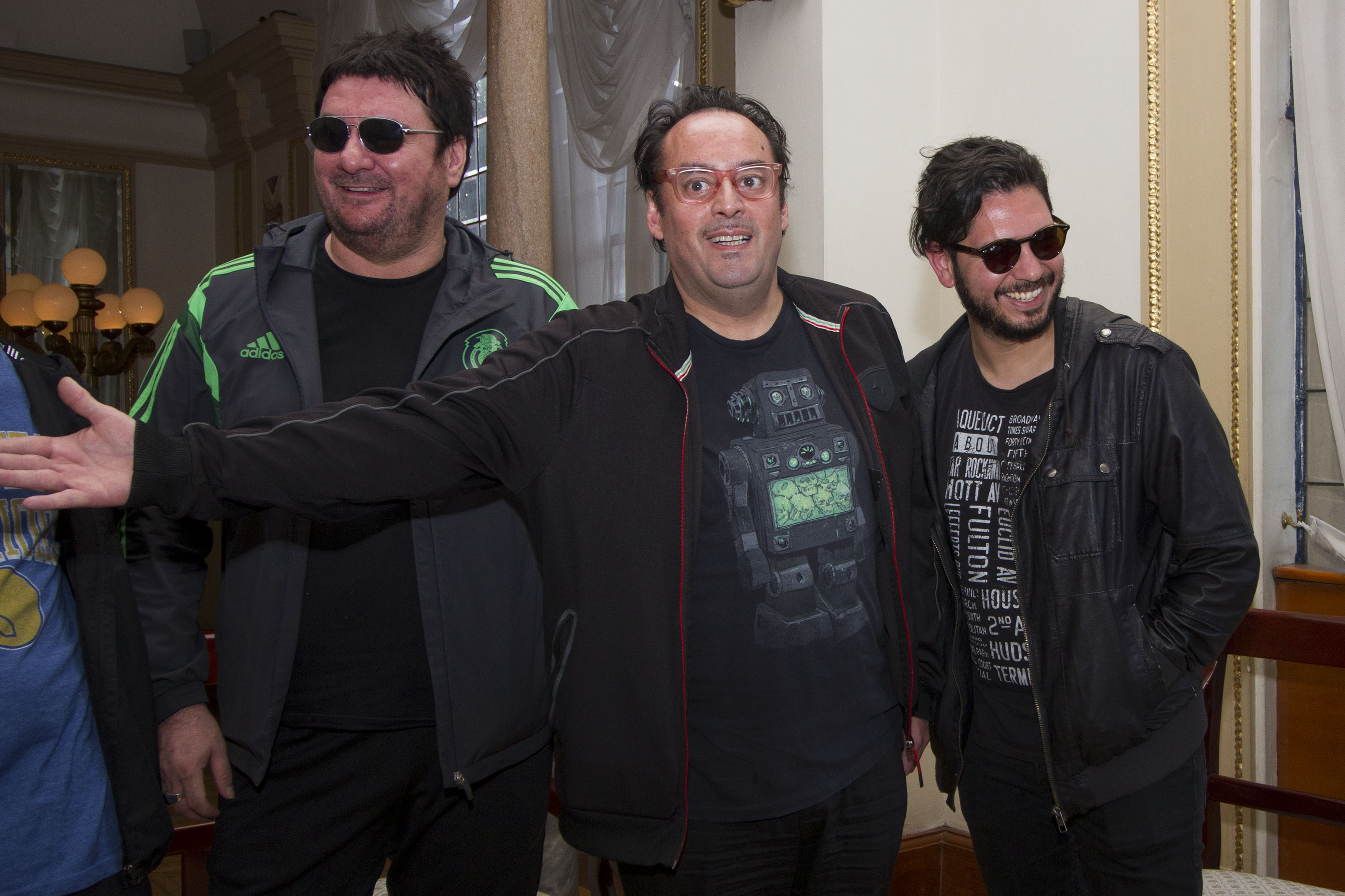 Miércoles 15 de junio de 2016. En el foyer del Teatro de la Ciudad Esperanza Iris, se realizó la conferencia de prensa de la agrupación chilena Los Tres, para celebrar dos décadas del lanzamiento de su unplugged, además de presentar su mas reciente álbum: Por Acanga, el cual esta compuesto por seis canciones y en ellas se encuentra el poder del rock y la melancolía de la balada que con matices de rockabilly son acompañados por letras de amor y desamor. Fotografía: Tania Victoria / Secretaría de Cultura CDMX